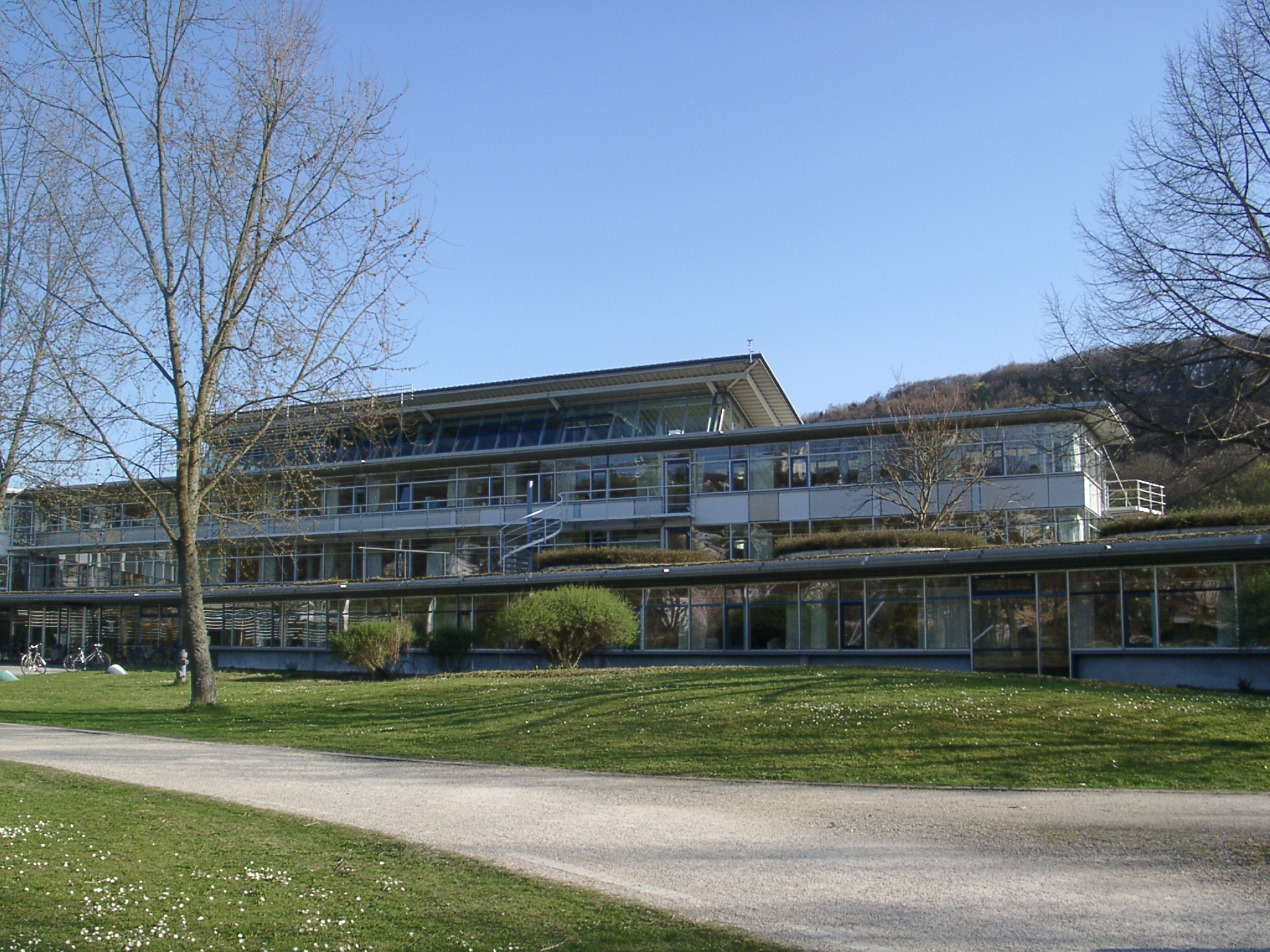 Universitätsbibliothek Eichstätt, Zentralbibliothek, Architekt: Günter Behnisch